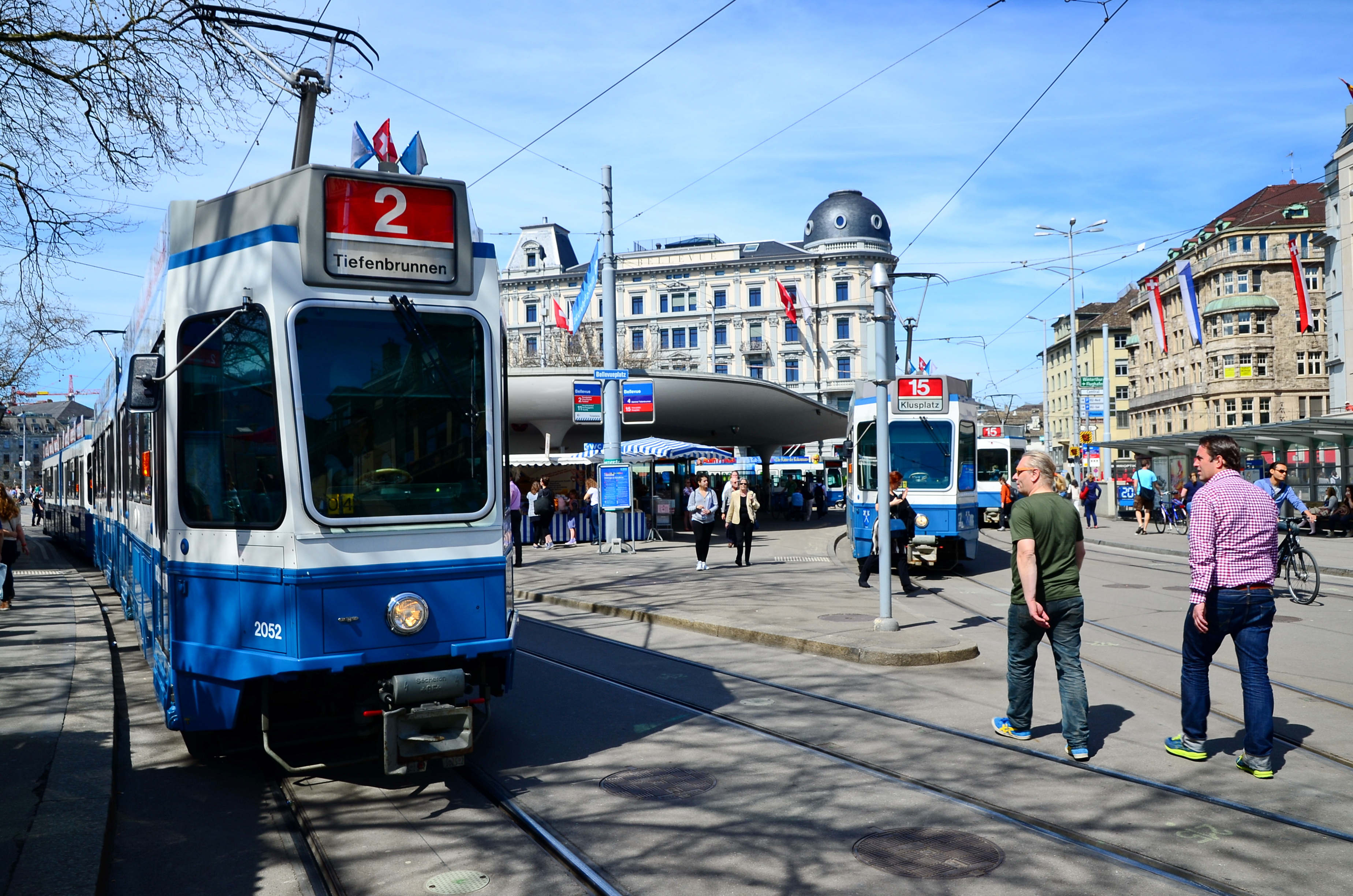 Bellevue in Zürich (Switzerland)